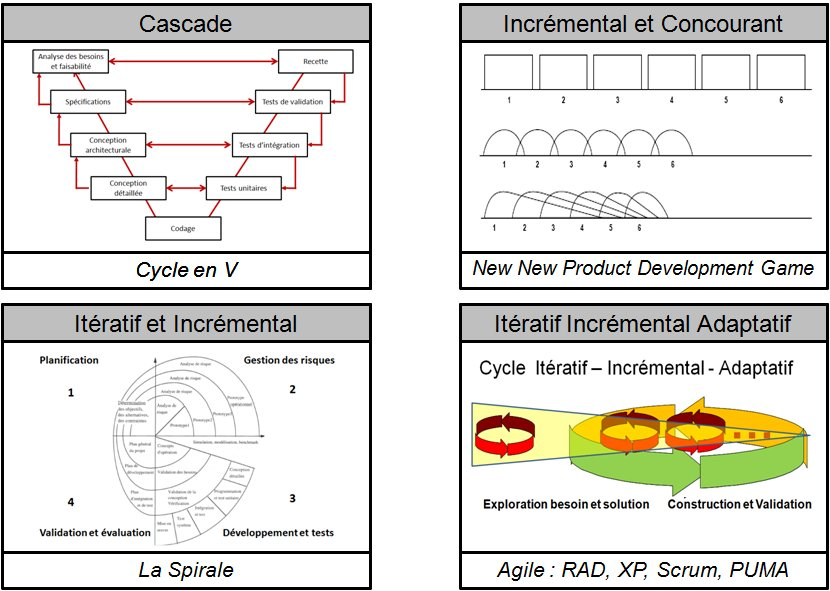 Eolution des cycles basiques